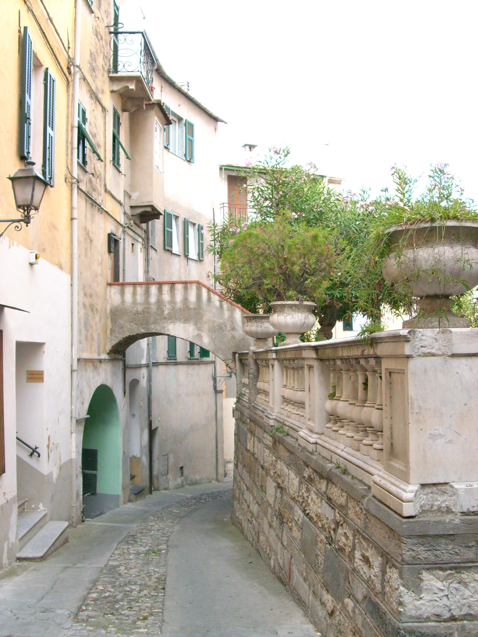 Pontedassio, Liguria, Italia